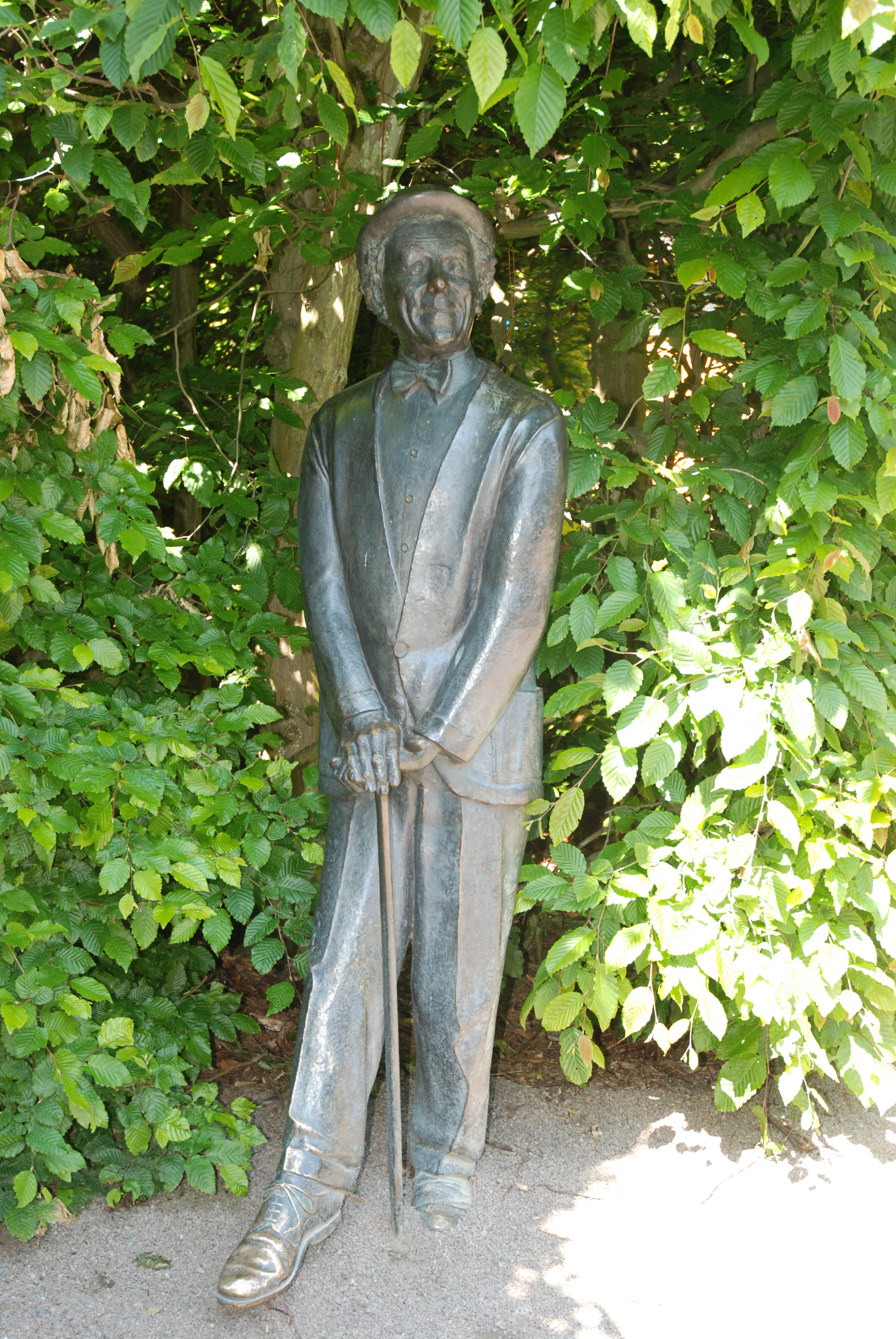 Jonas Högström´s portrait av Swedish actor and theatre manager Nils Poppe, Fredriksdalsparken, Helsingborg, Sweden